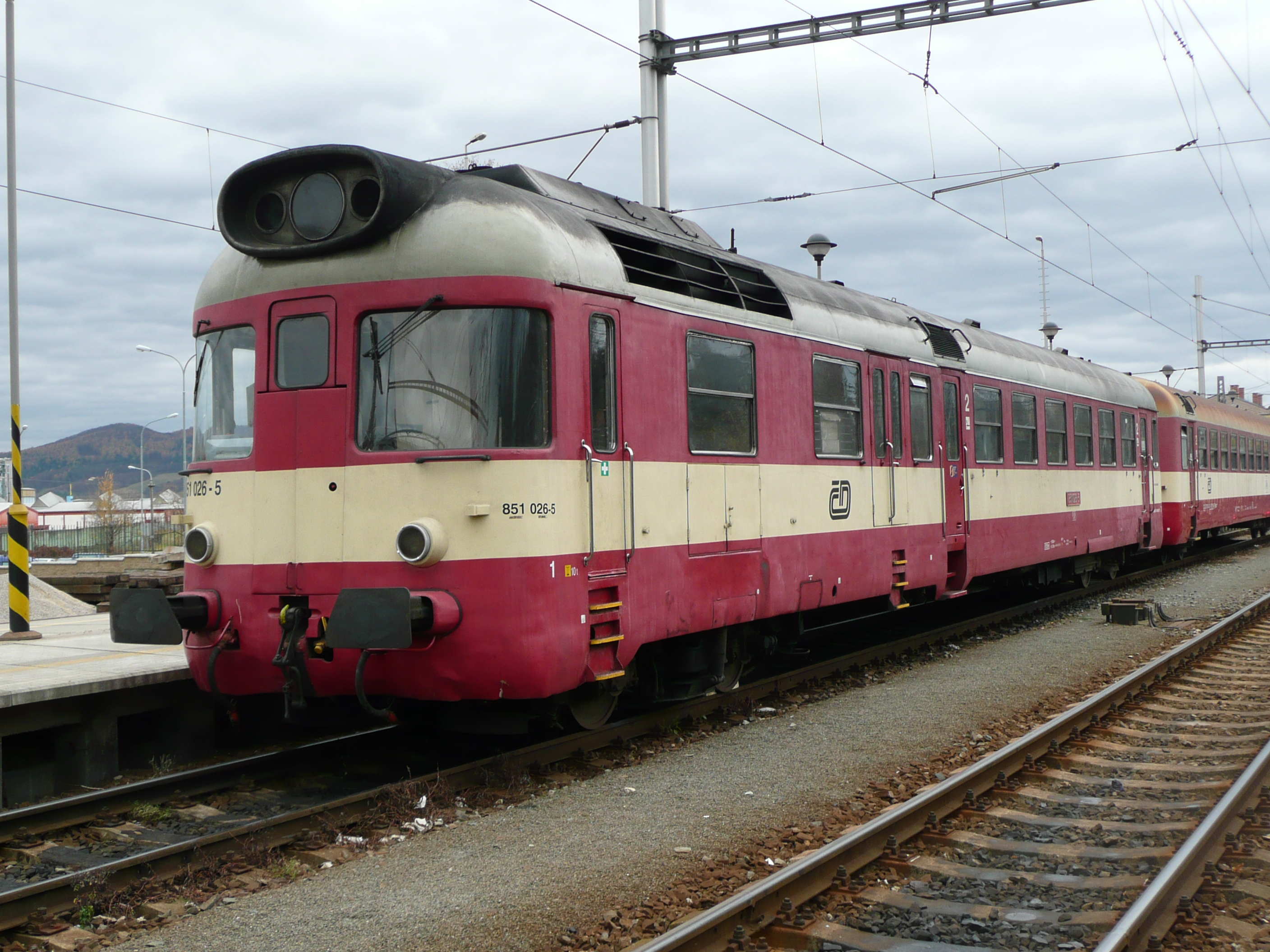 851 026 vor Schnellzug nach Jesenik im Bahnhof Zábřeh